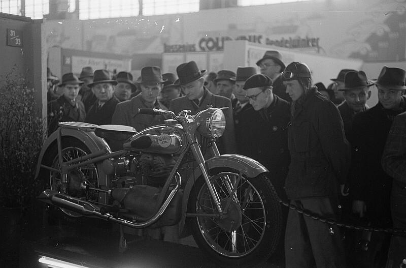 Original image description from the Deutsche Fotothek Messebesucher vor einem Motorrad AWO 425